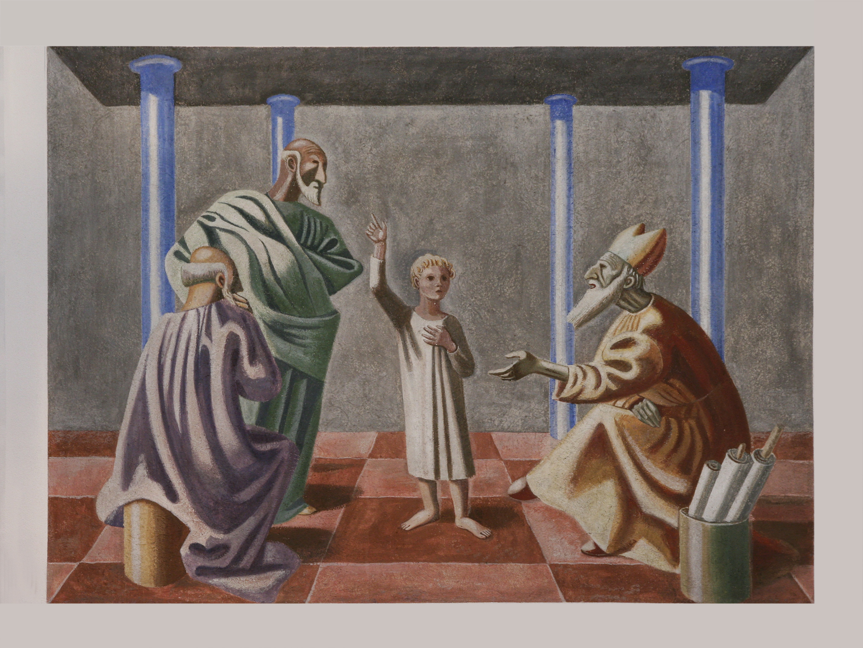 Römisch-katholische Pfarrkirche St. Theresia Zürich-Friesenberg, Fresko von Richard Seewald